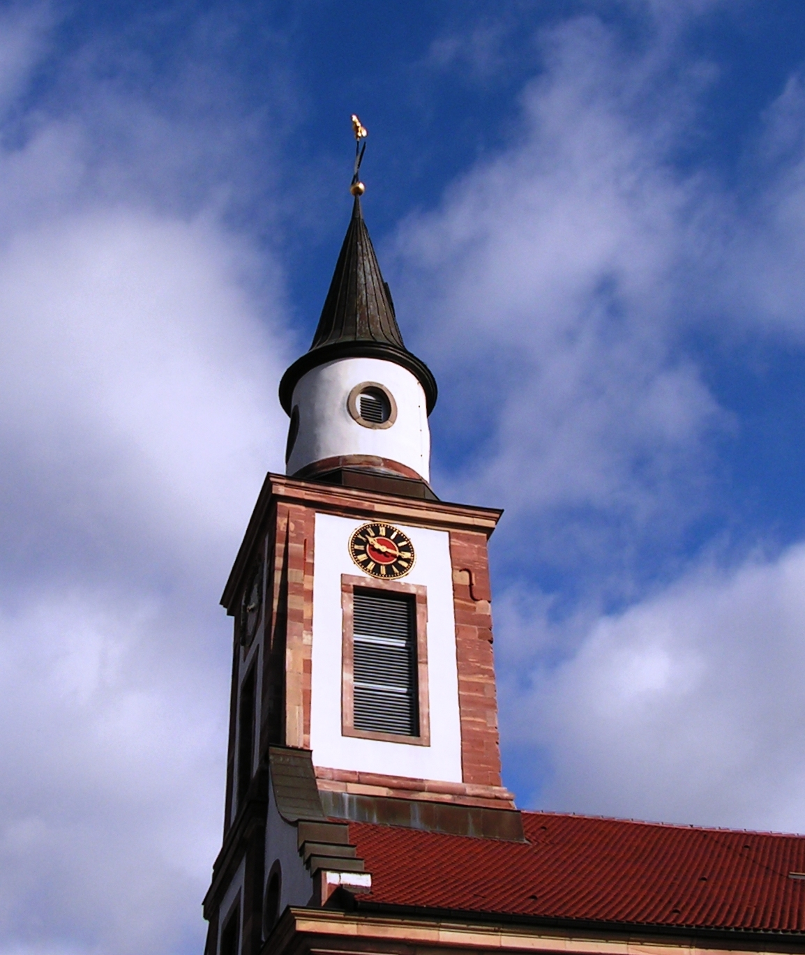 Le vieux village